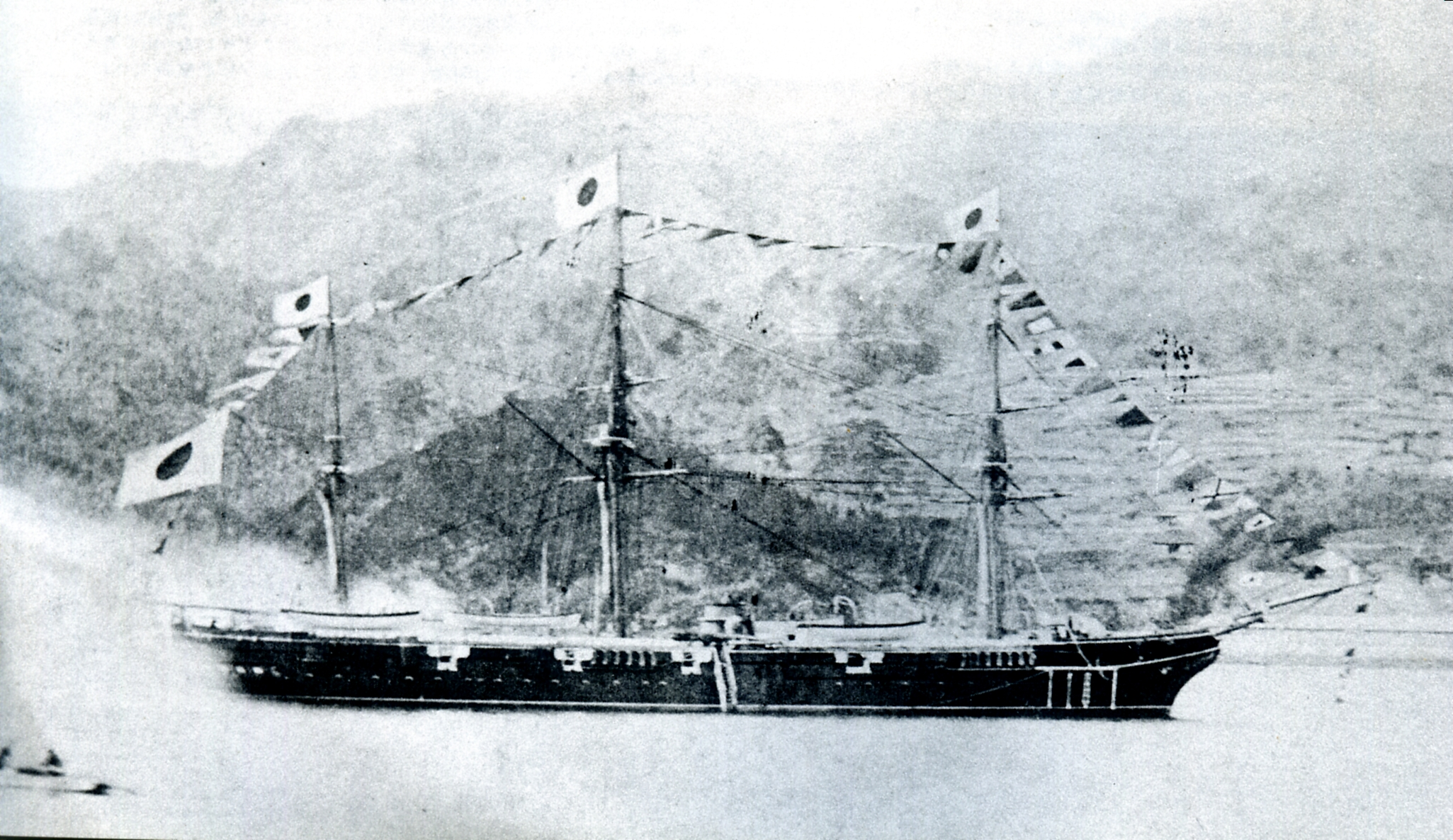 Japanese sloop-of-war Kaimon